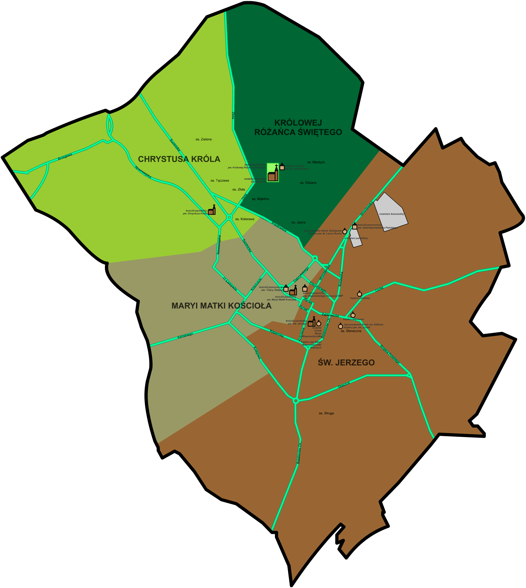 Mapa Dzierżoniowa z podziałem na parafie. Umieszczono na niej wszystkie obiekty kultu religijnego należące do Kościoła katolickiego.